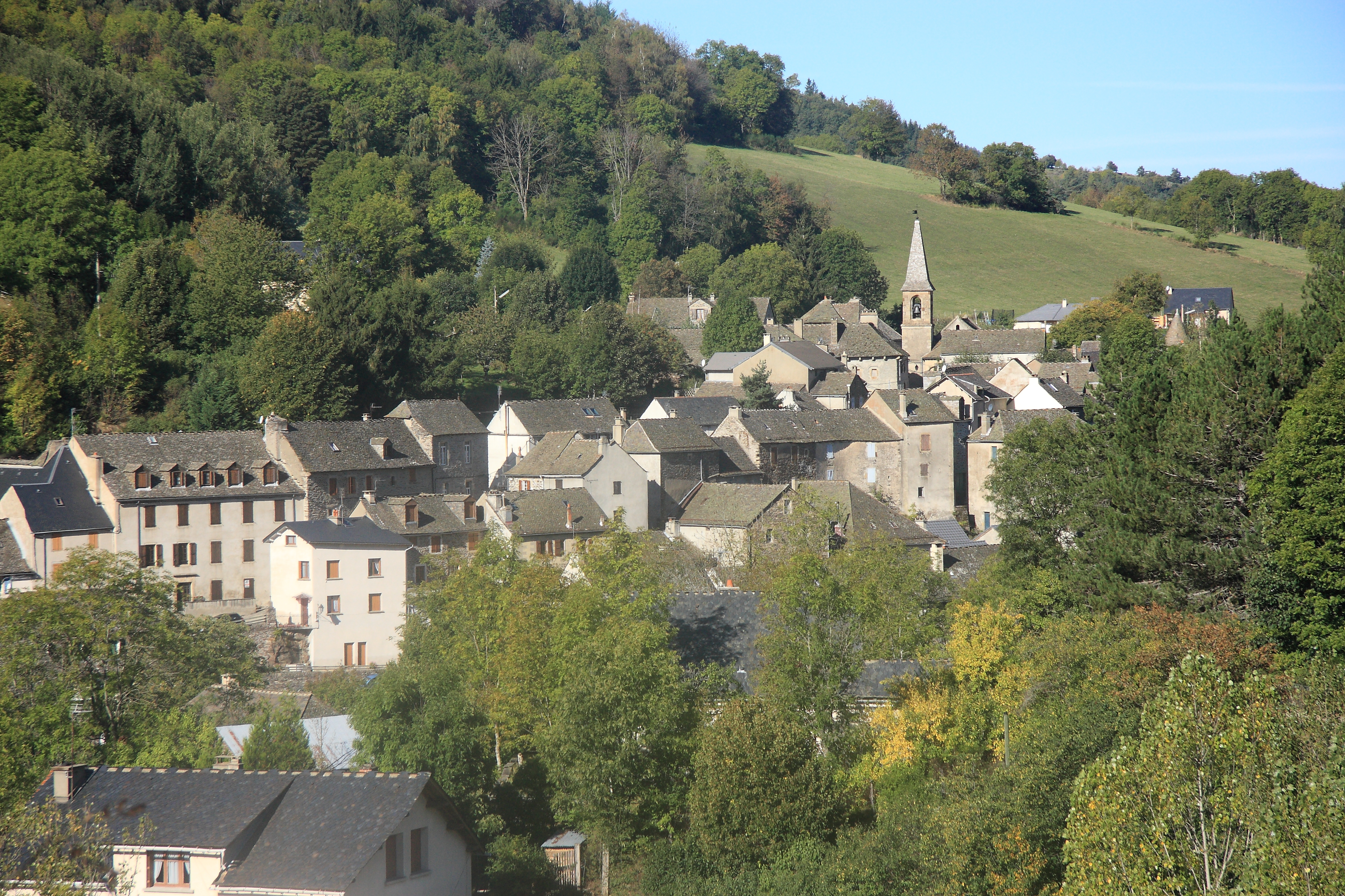 Bagnols-les Bains, commune de la Lozère